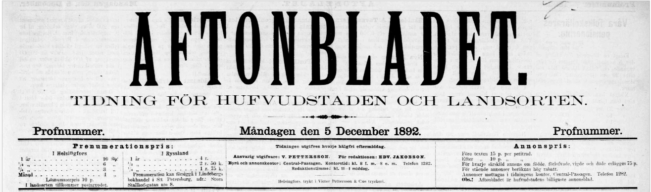 Headern i första provexemplaret av Aftonbladet som utkom 5 dec 1892